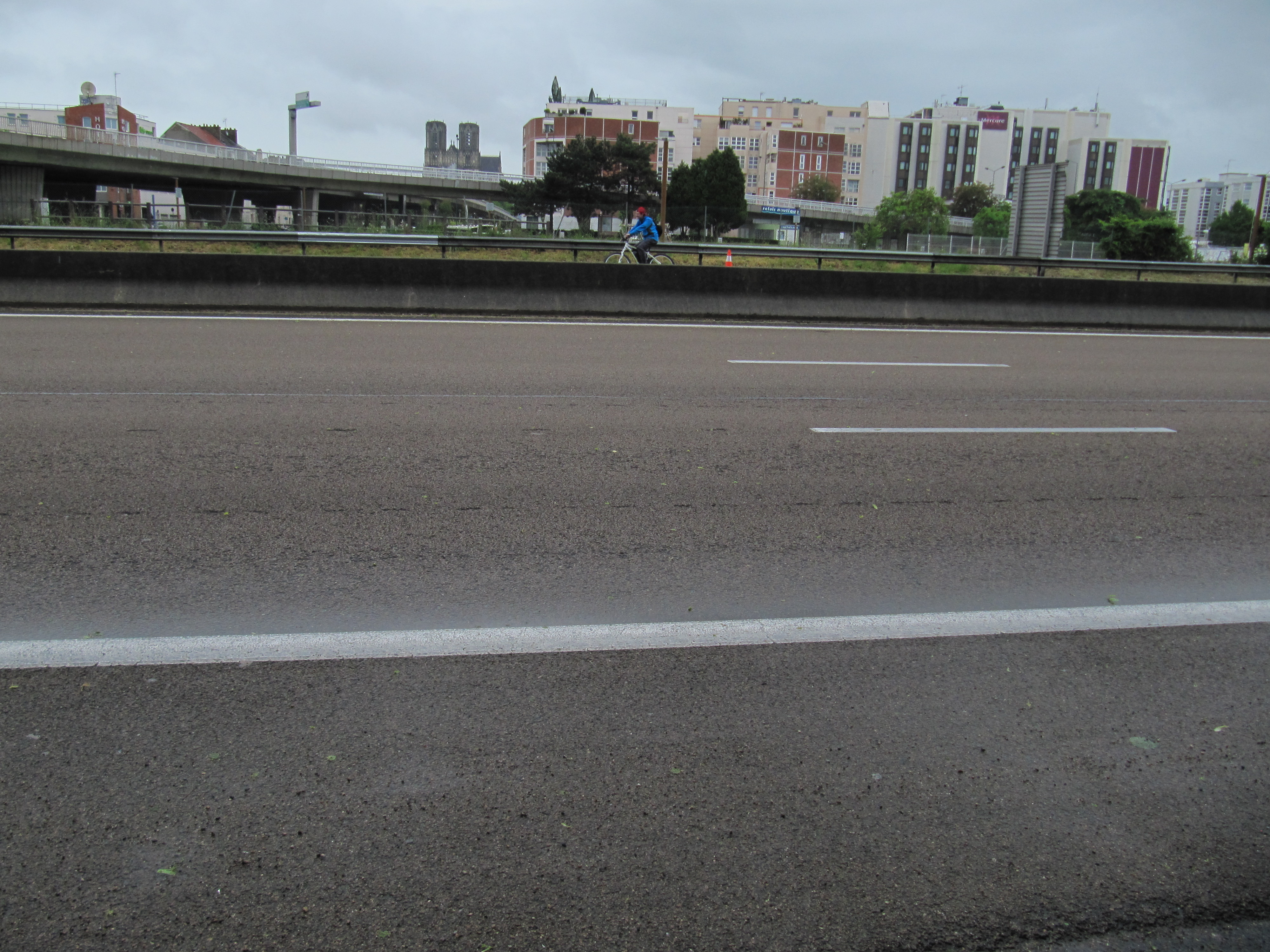 Ouverture aux piétons et vélos. Au fond la cathédrale.